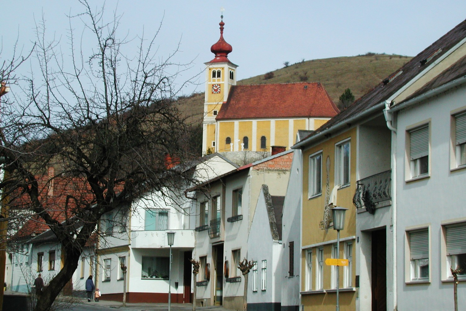 Donnerskirchen in Burgenland - Donnerskirchen im Burgenland